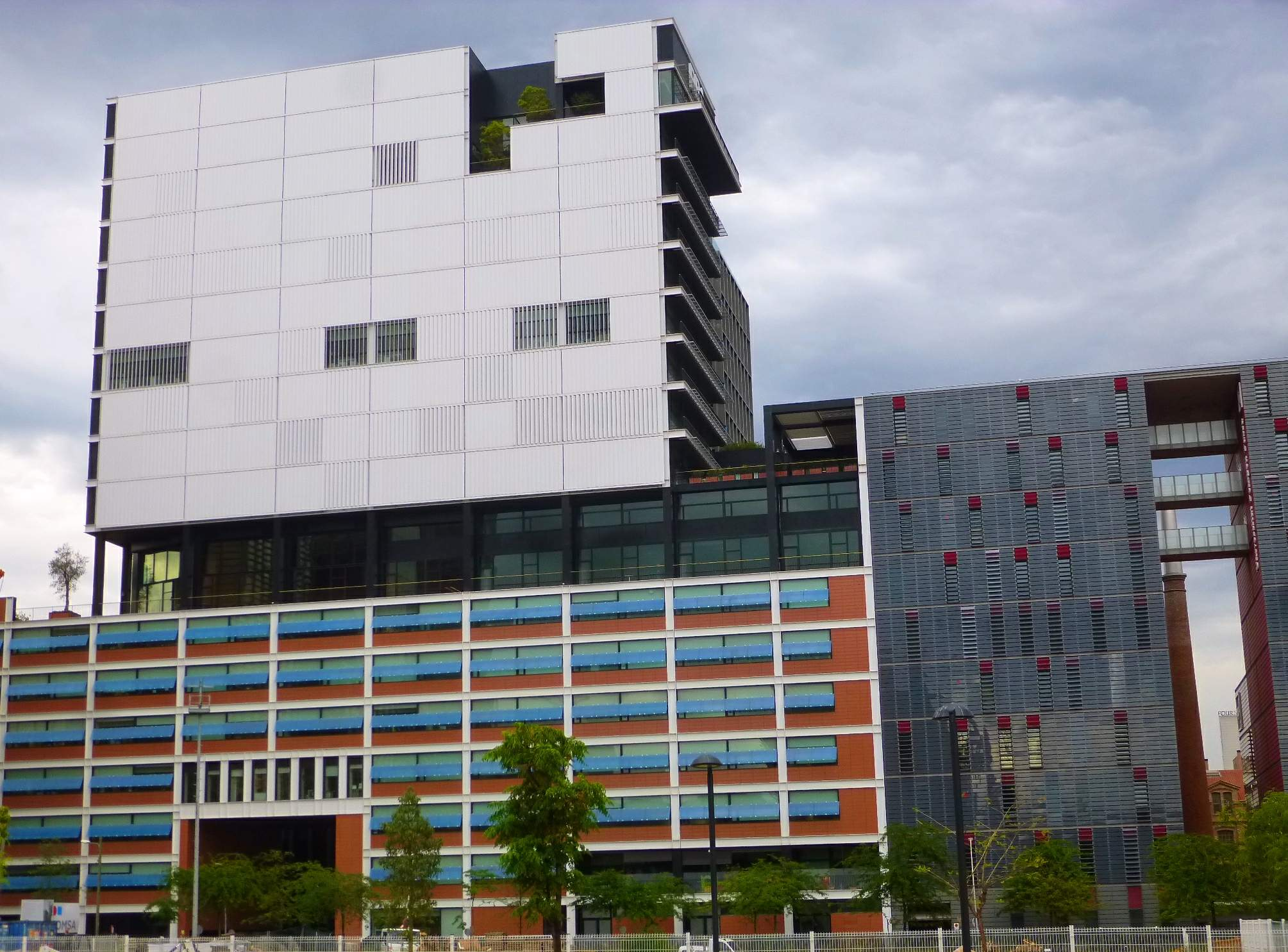 Barcelona - Edifici RBA y Edifici Roc Boronat (UPF)